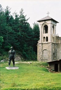 Drežnica, Hrvaška. Spomenik padlim borcem II. svetovne vojne in pravoslavna cerkev.